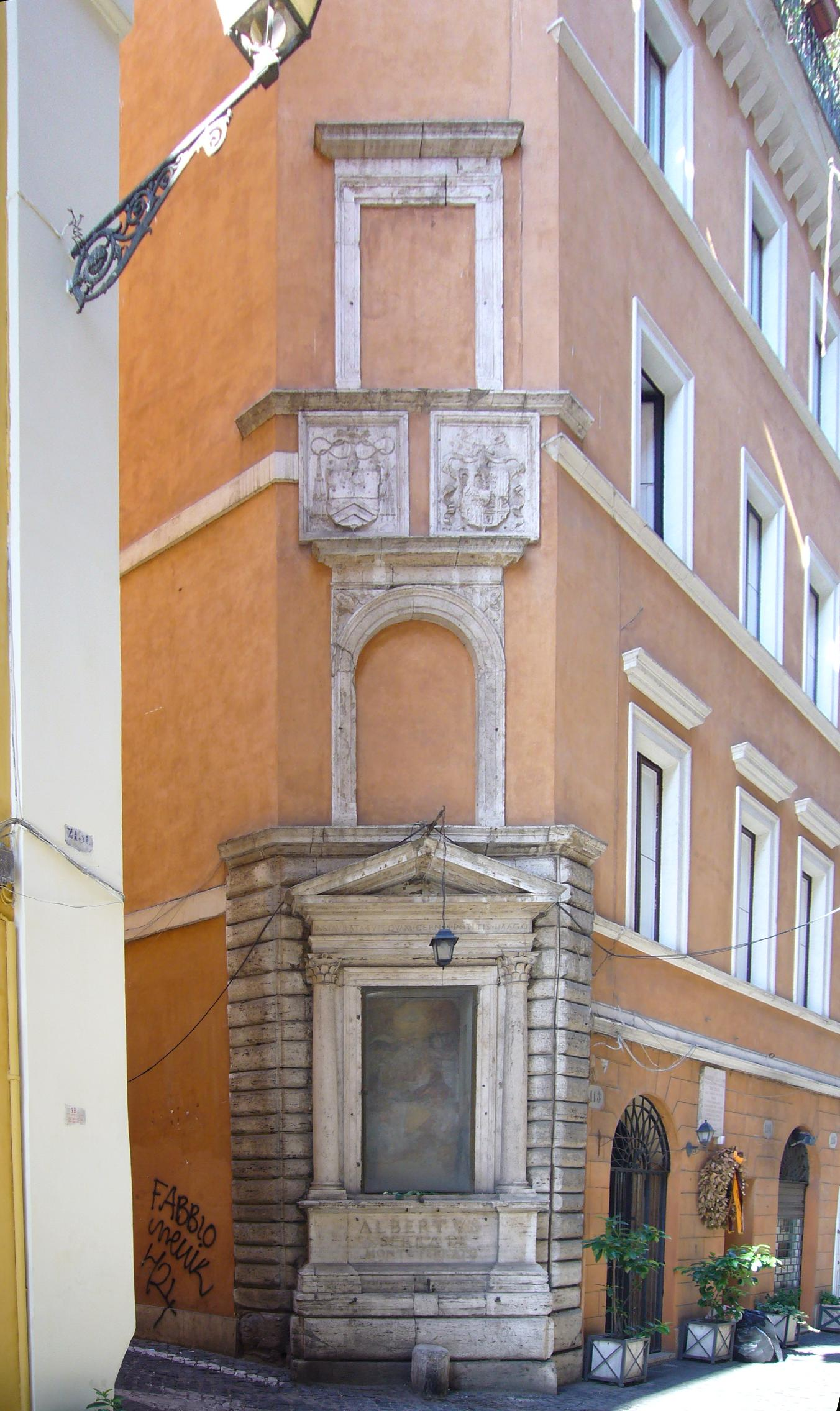 Roma, via dei Coronari: l'Immagine di Ponte (edicola di Antonio da Sangallo, dipinto "Incoronazione della Vergine" di Perin del Vaga) - 1523